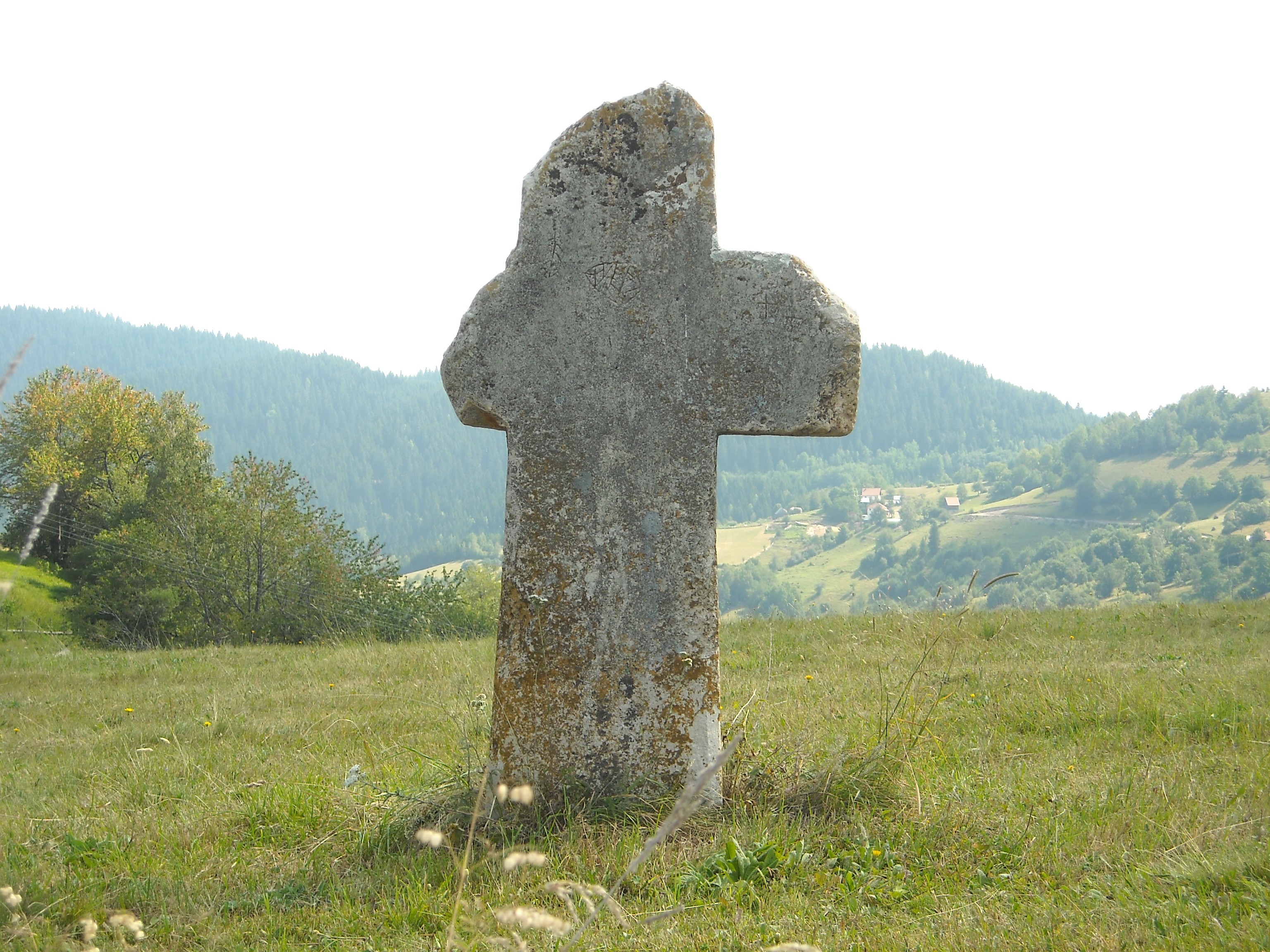 Spomenik kulture u Moravickom okrugu